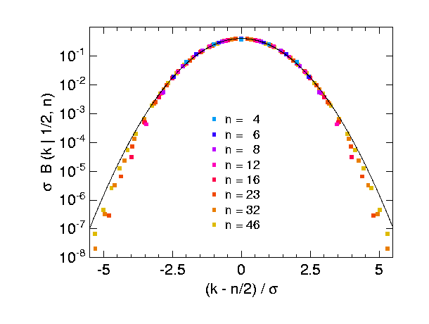 selbst geplottet